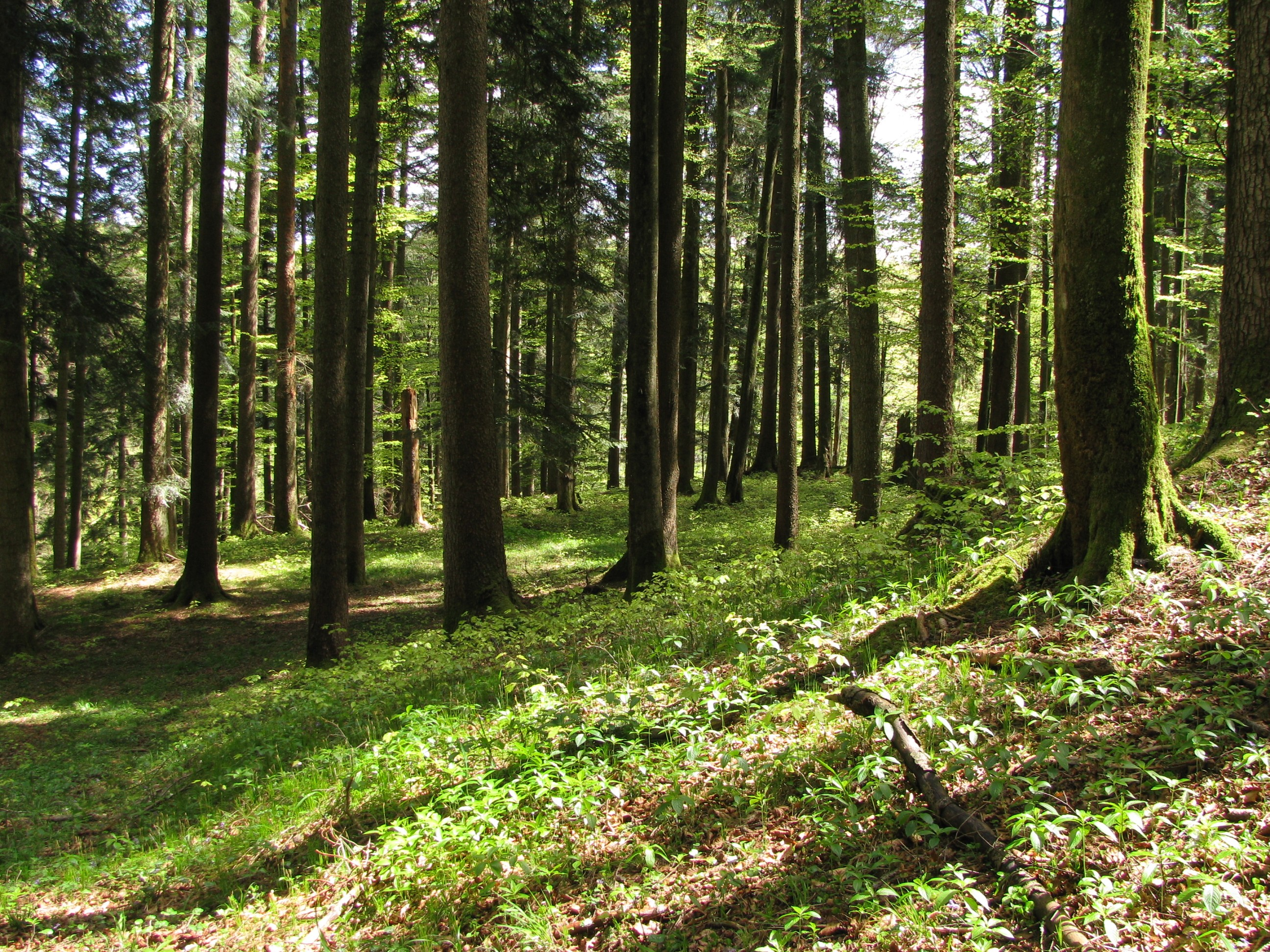 Burgstall Eichelschwang